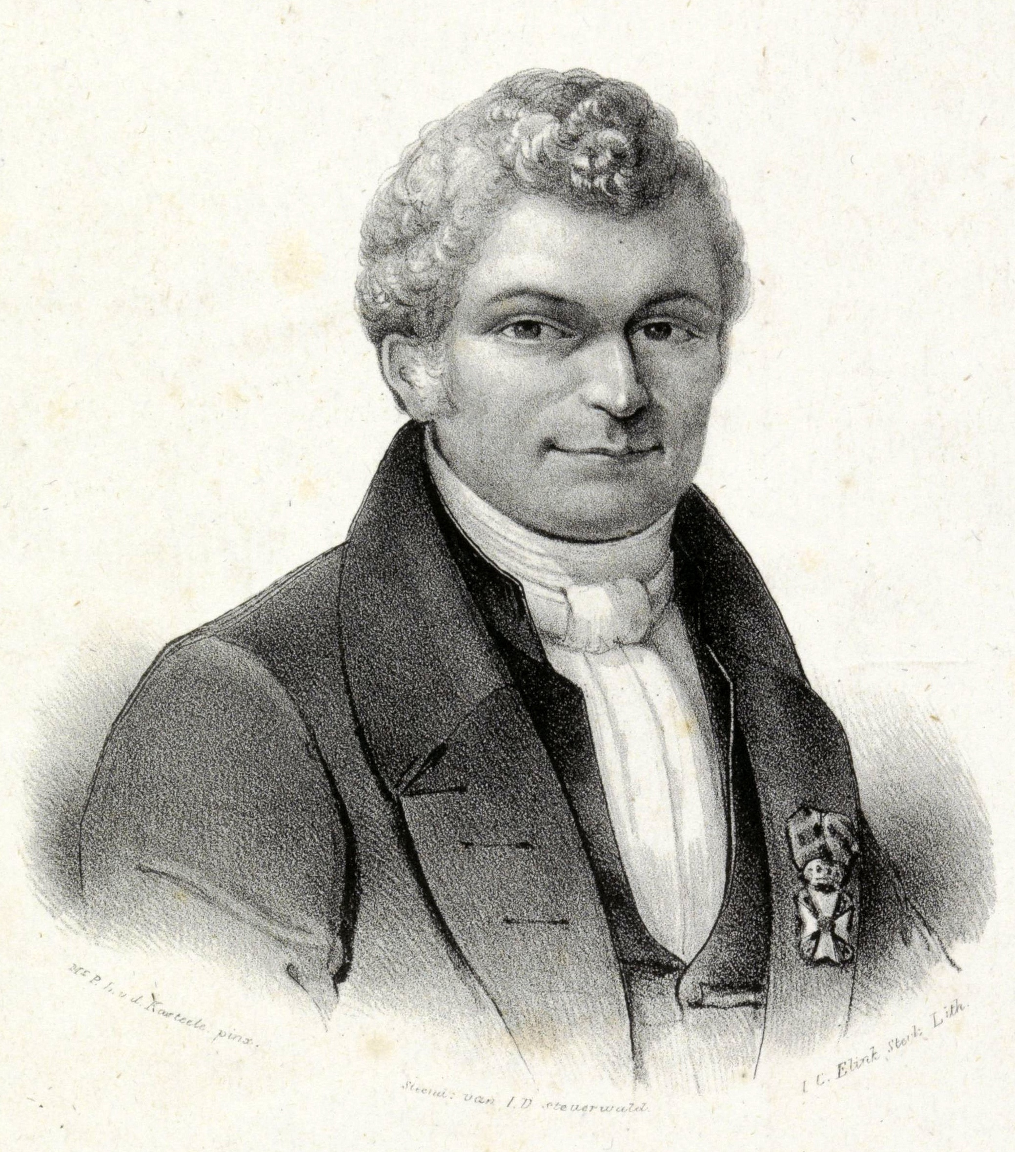 Jacob Carel van de Kasteele (1780-1835), jurist, politicus, bestuurder.